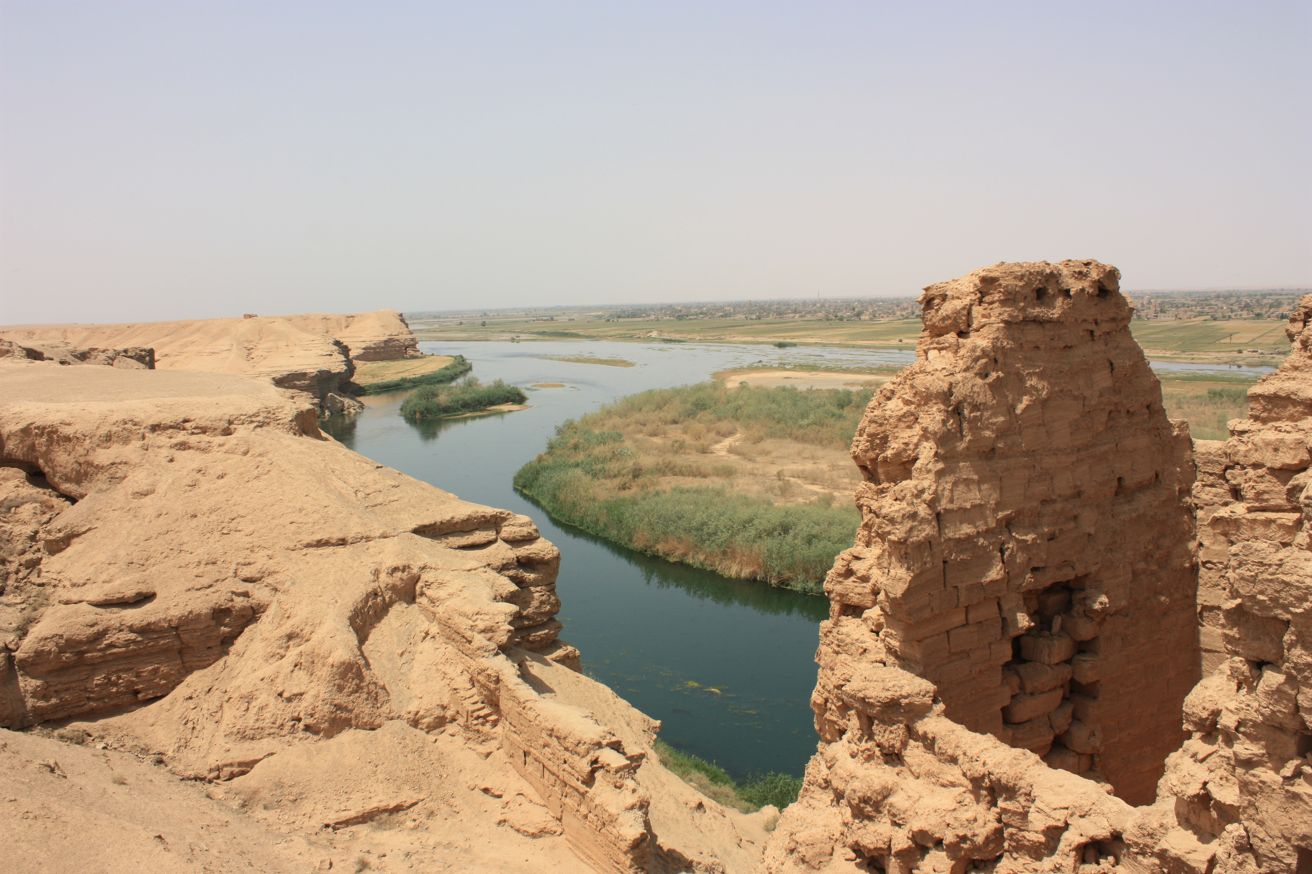 Deir ez-Zur - Abu Kamal, Dura Europos, Euphrates